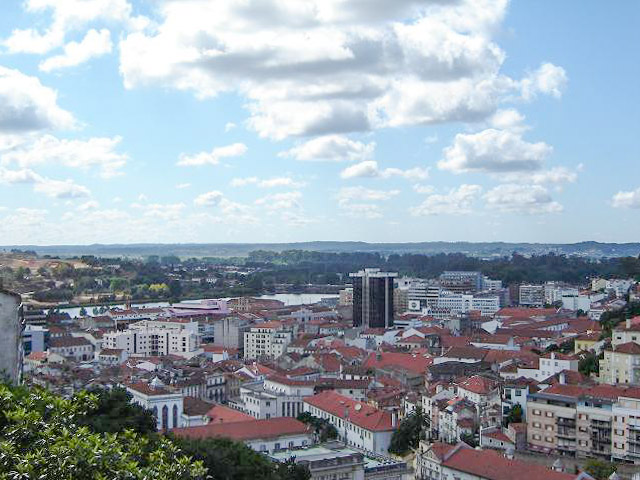 Vista de Coimbra.